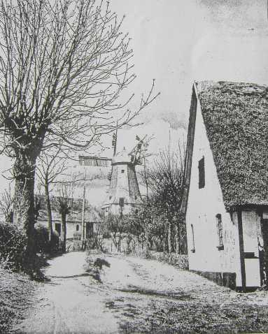 Et boxkamerabillede af Hine Mølle, lige før mølleren rev den ned